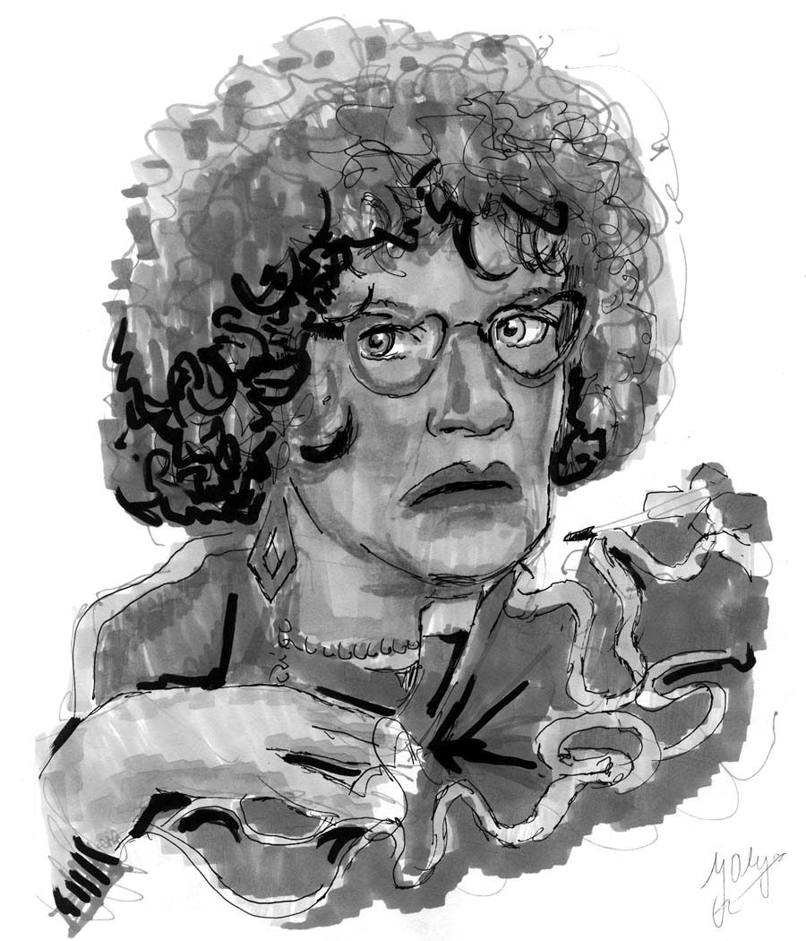 tekening van Tante Til met markers en fineliner door Jan Olijve